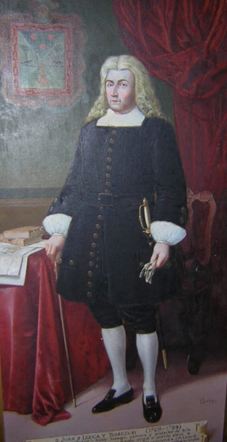 Don Juan de Lezica y Torrezuri (retrato)